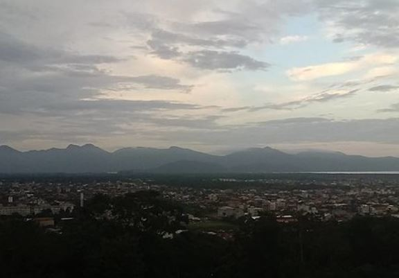 Vista de cima do bairro Aventureiro. Aos fundos a Baía da Babitonga.